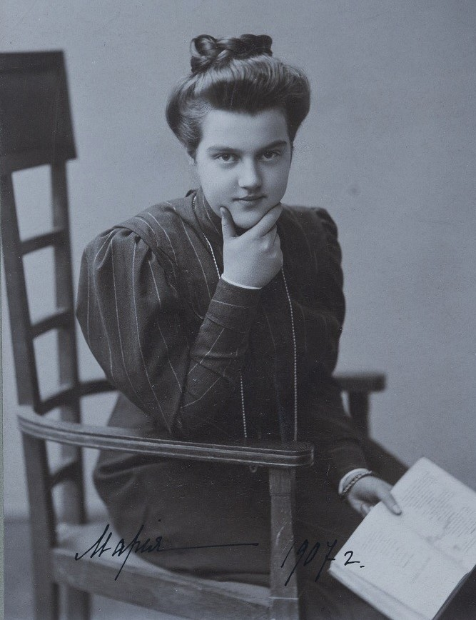 Портрет великой княжны Марии Павловны-младшей, Москва. 1907 г. Карл (Август) Андреевич Фишер.